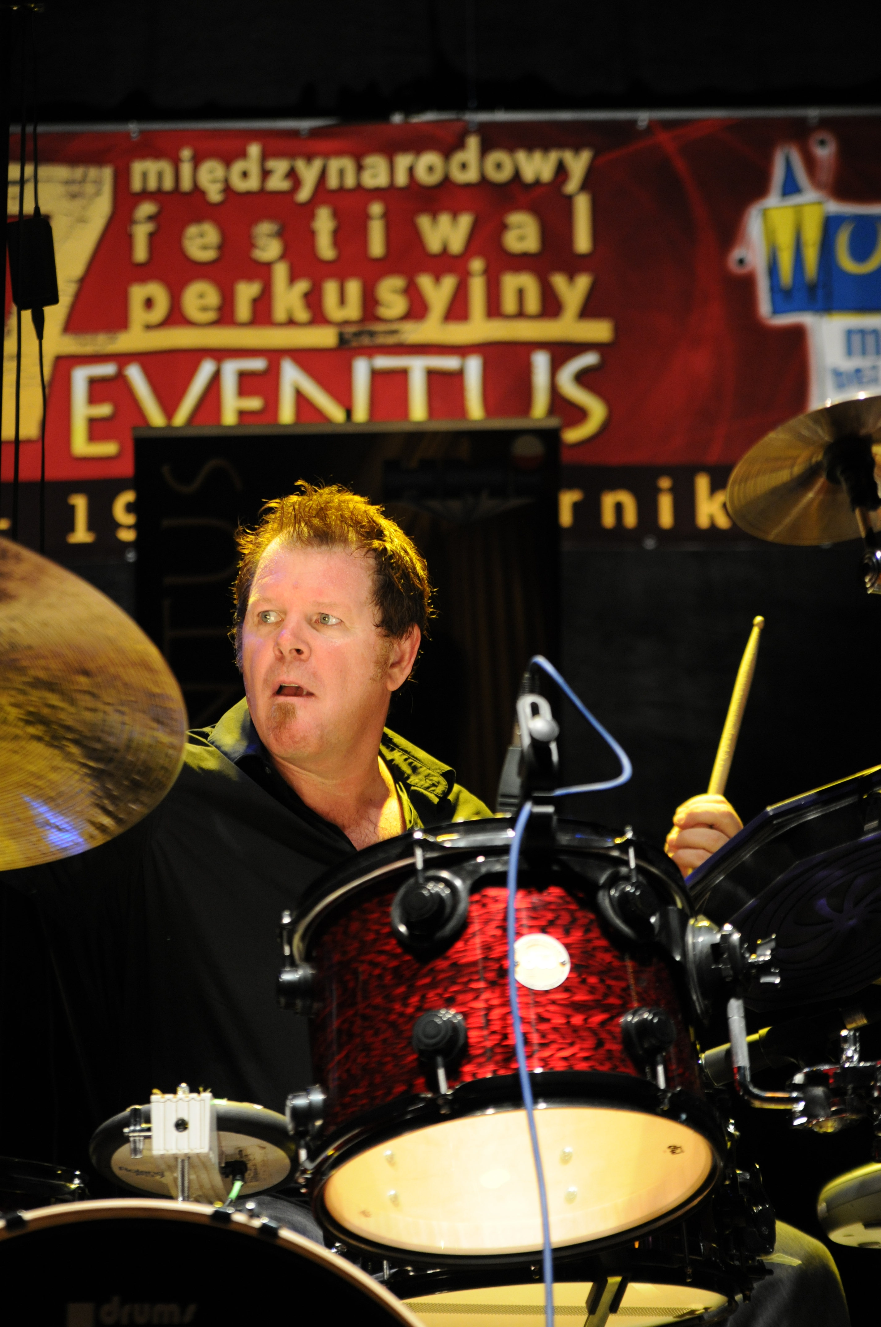 Pat Mastelotto